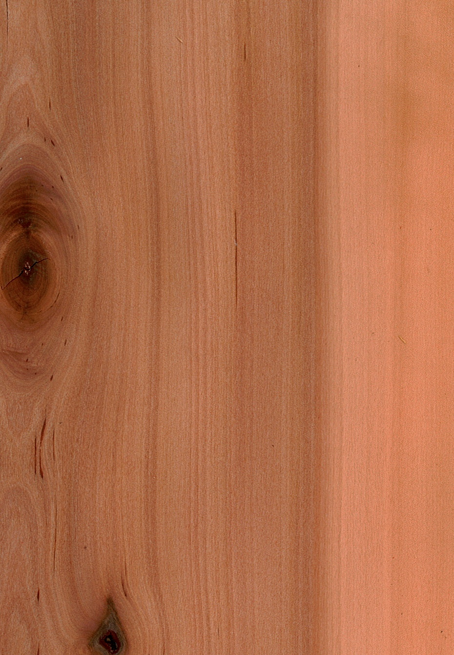 Schweizer Birnbaum oder echter Birnbaum mit Ast